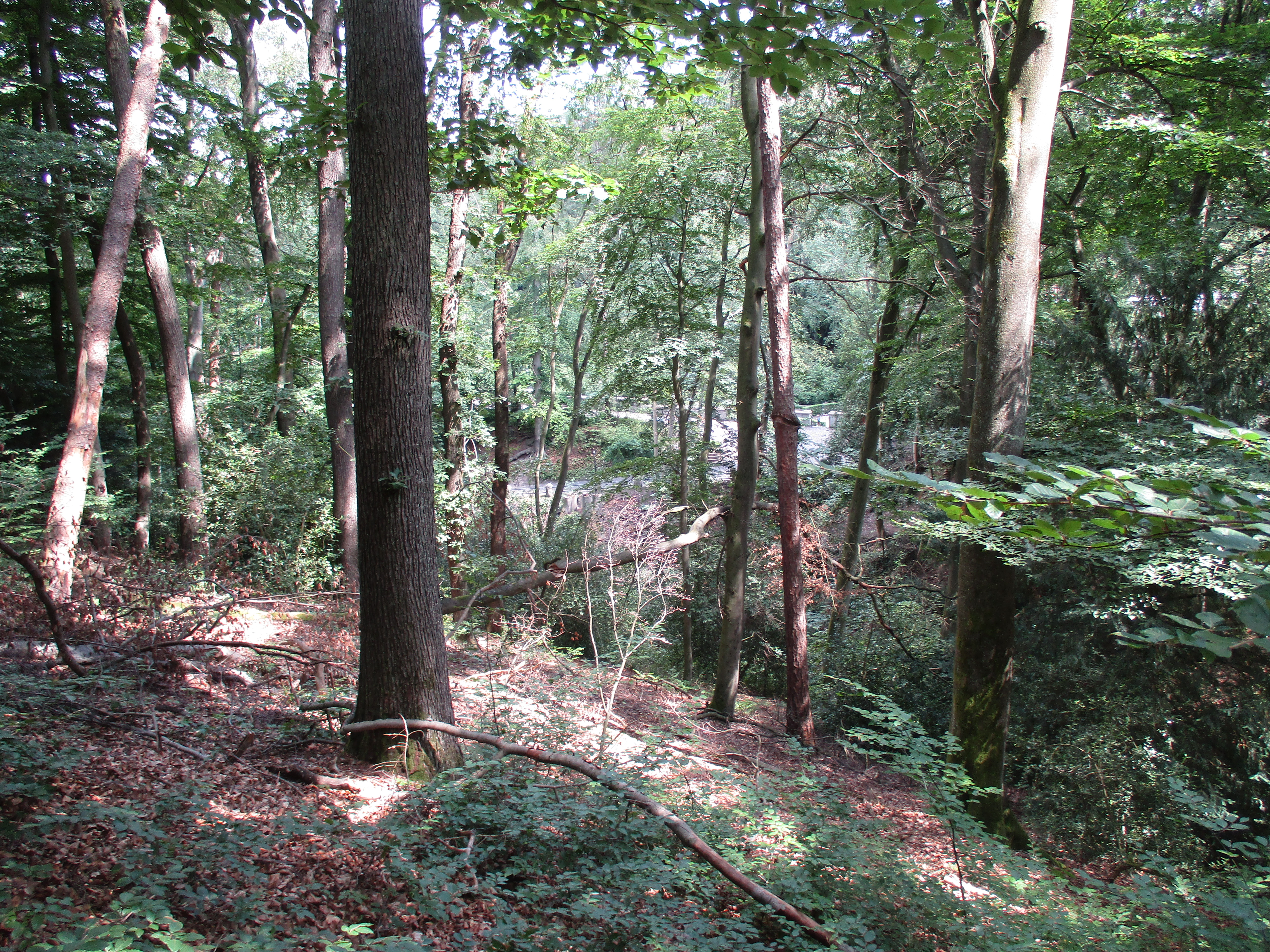 Wälder bei Hugenpoet und Landsberg, Nähe Schloss Landsberg